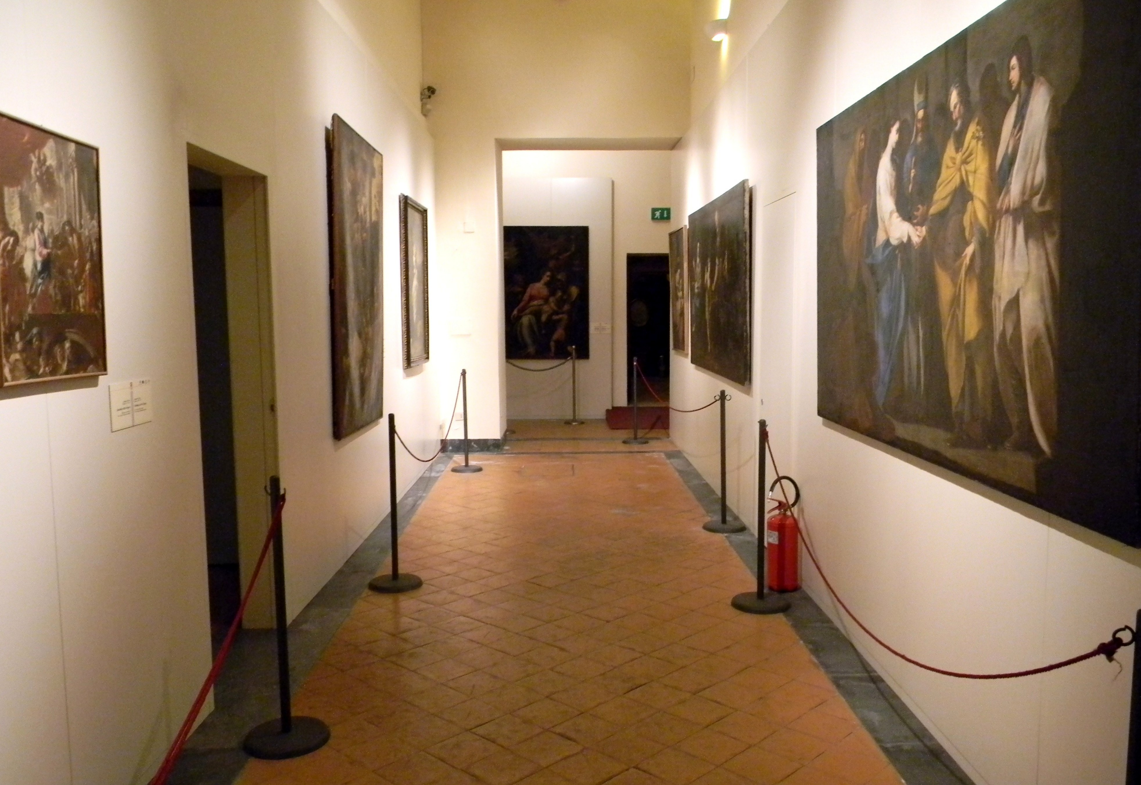 Museo diocesano di Napoli - Retroaltare